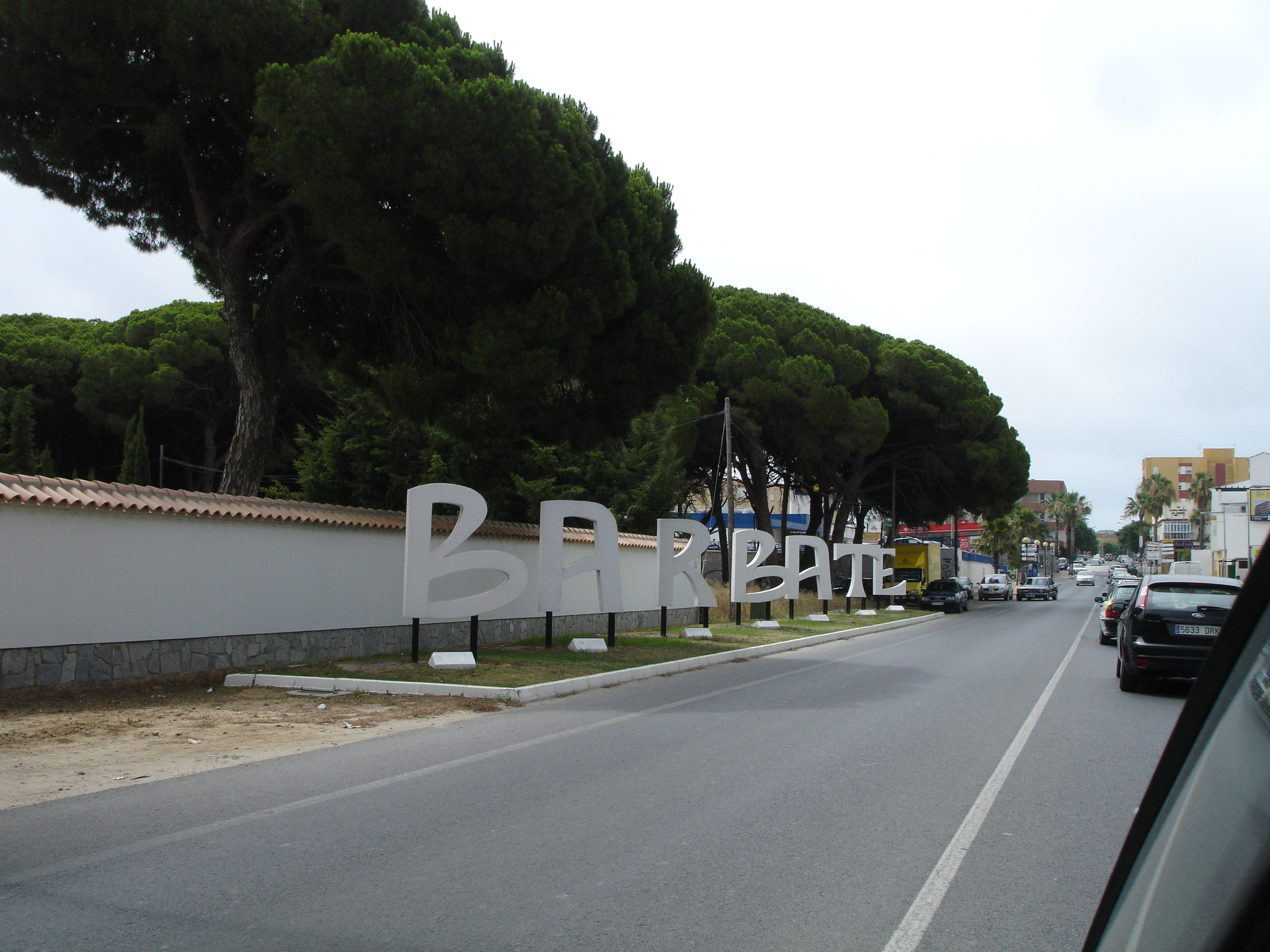 Barbate (Andalusia, Spain)